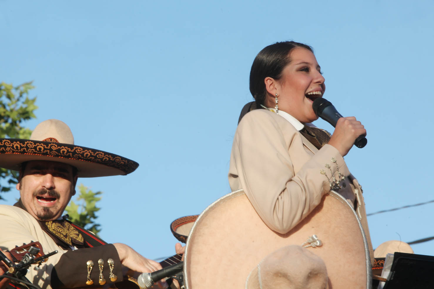 María José Quintanilla Sandoval (* Santiago de Chile, 17 de febrero de 1990) es una cantante chilena, surgida del programa televisivo "Rojo Fama Contrafama". Se le conoce también en Chile por su nombre artístico "María José" y por su apodo "Coté", como la llaman sus más cercanos..